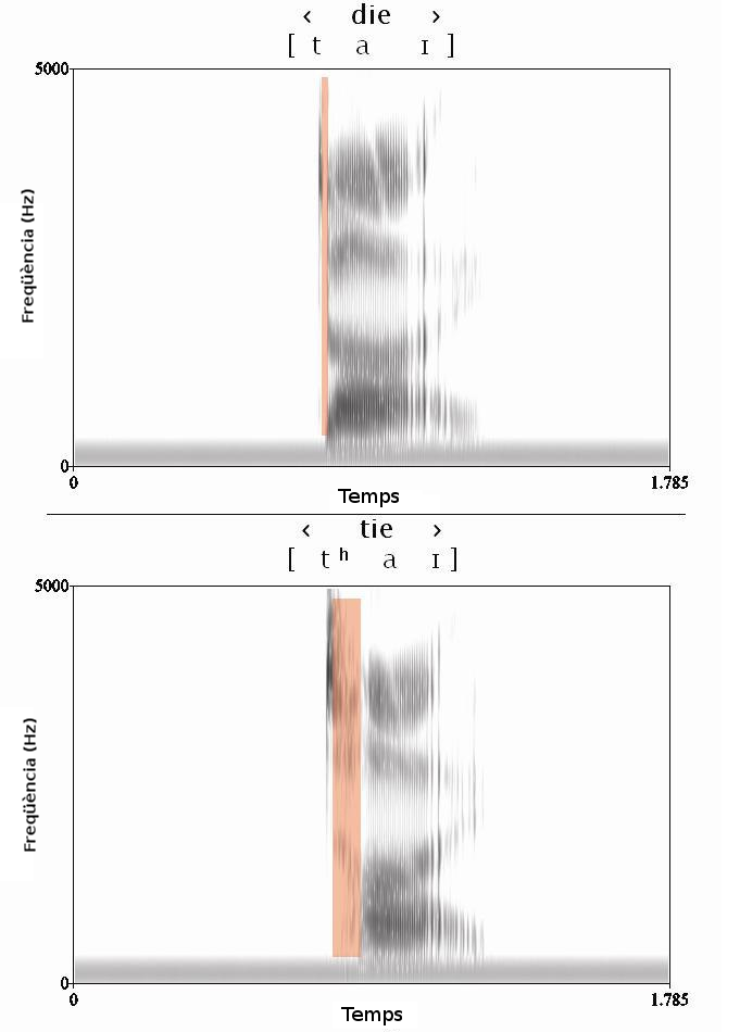 Diferències en el temps d'atac de la sonoritat per a les paraules angleses «tie» i «die»